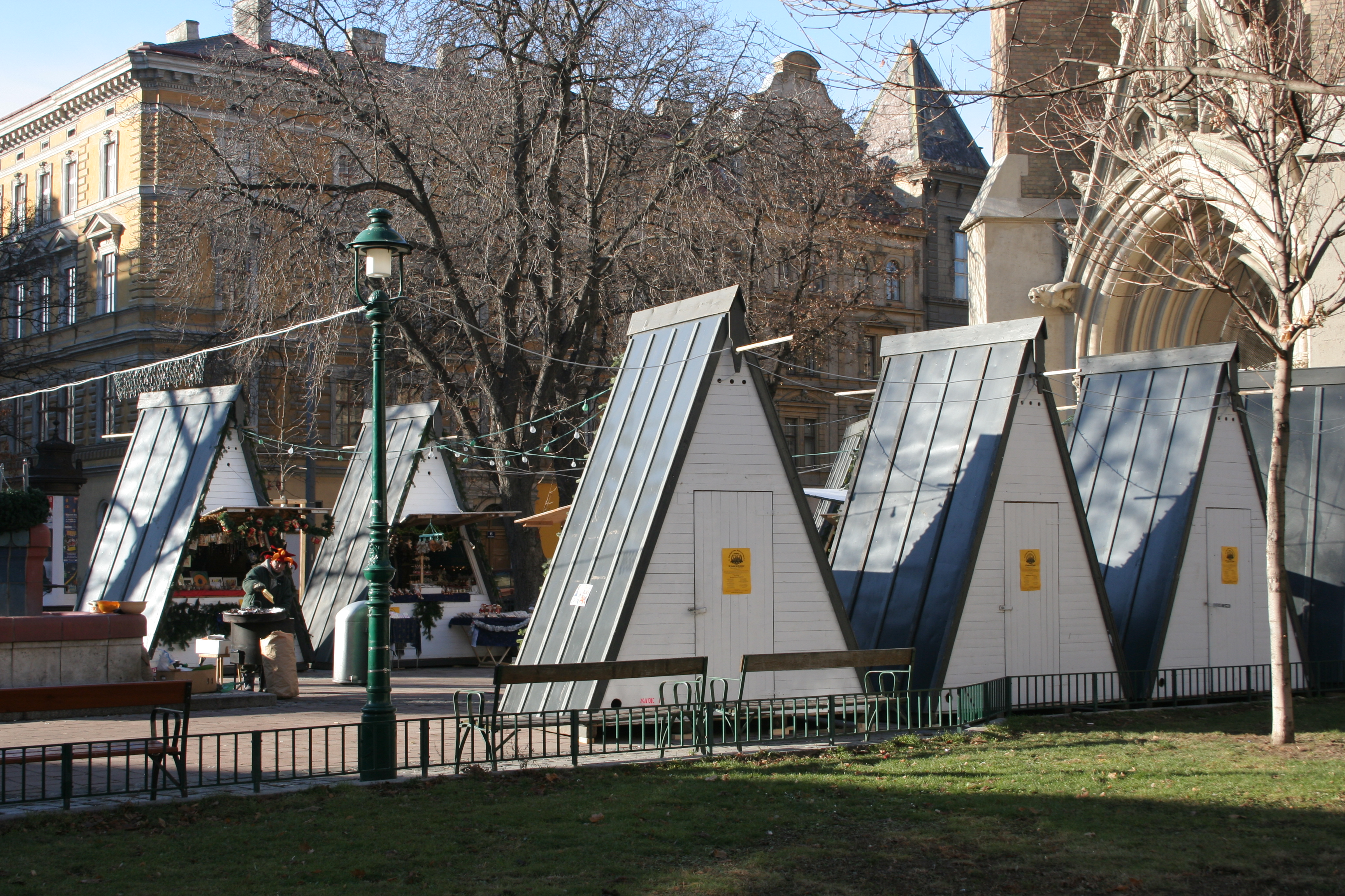 Christmas market "Weißgerber Adventmarkt" by Pfarre St. Othmar unter den Weißgerbern